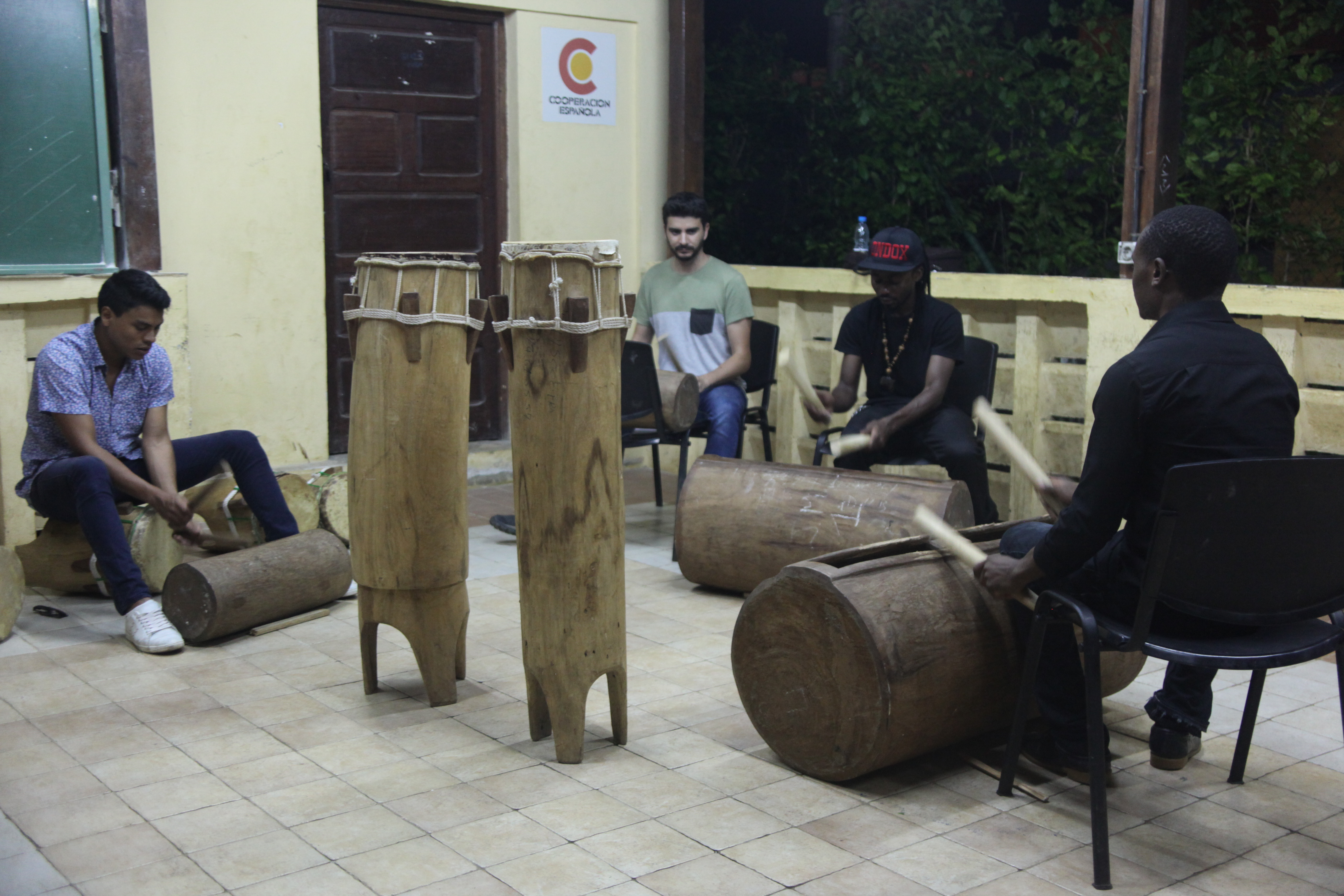 Taller de percusión tradicional de Guinea Ecuatorial en la Casa de la Palabra (Abahá) del Centro Cultural de España en Malabo. This is an image of "African people at work" from Equatorial Guinea